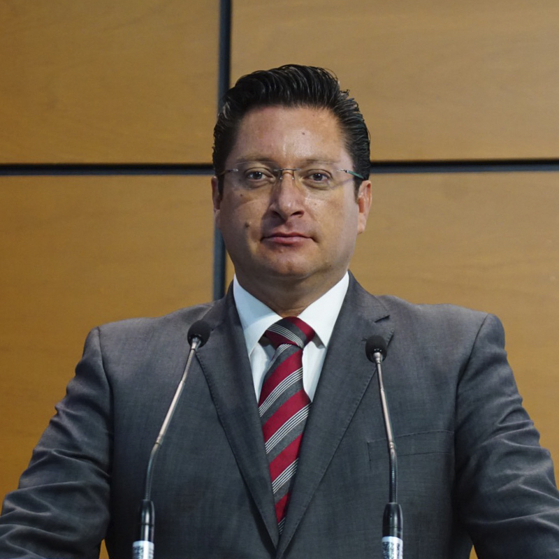 Segundo Informe de Actividades LXIII Legisltarua en la Honorable Cámara de Diputados.